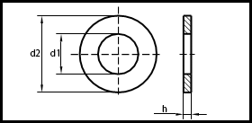 ISO 7091